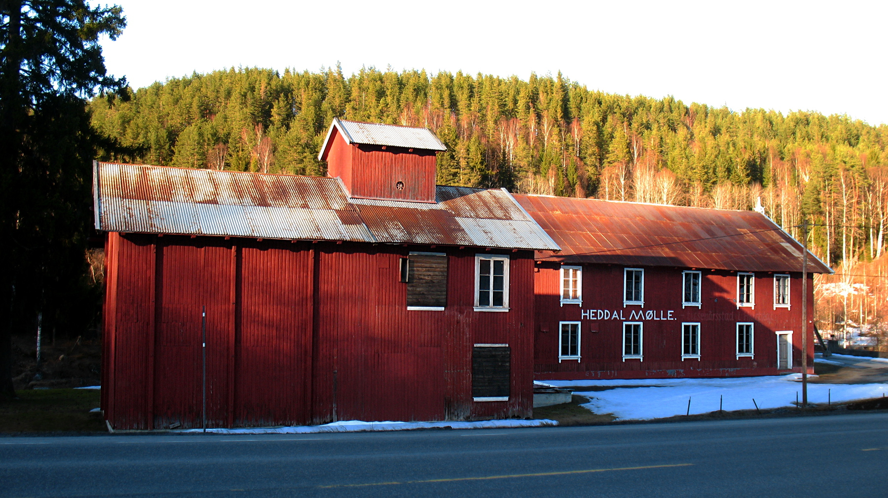 Hjartdal kommunes tusenårssted, Heddal mølle, Omnesfoss gnr 81, bnr 4, fnr 1